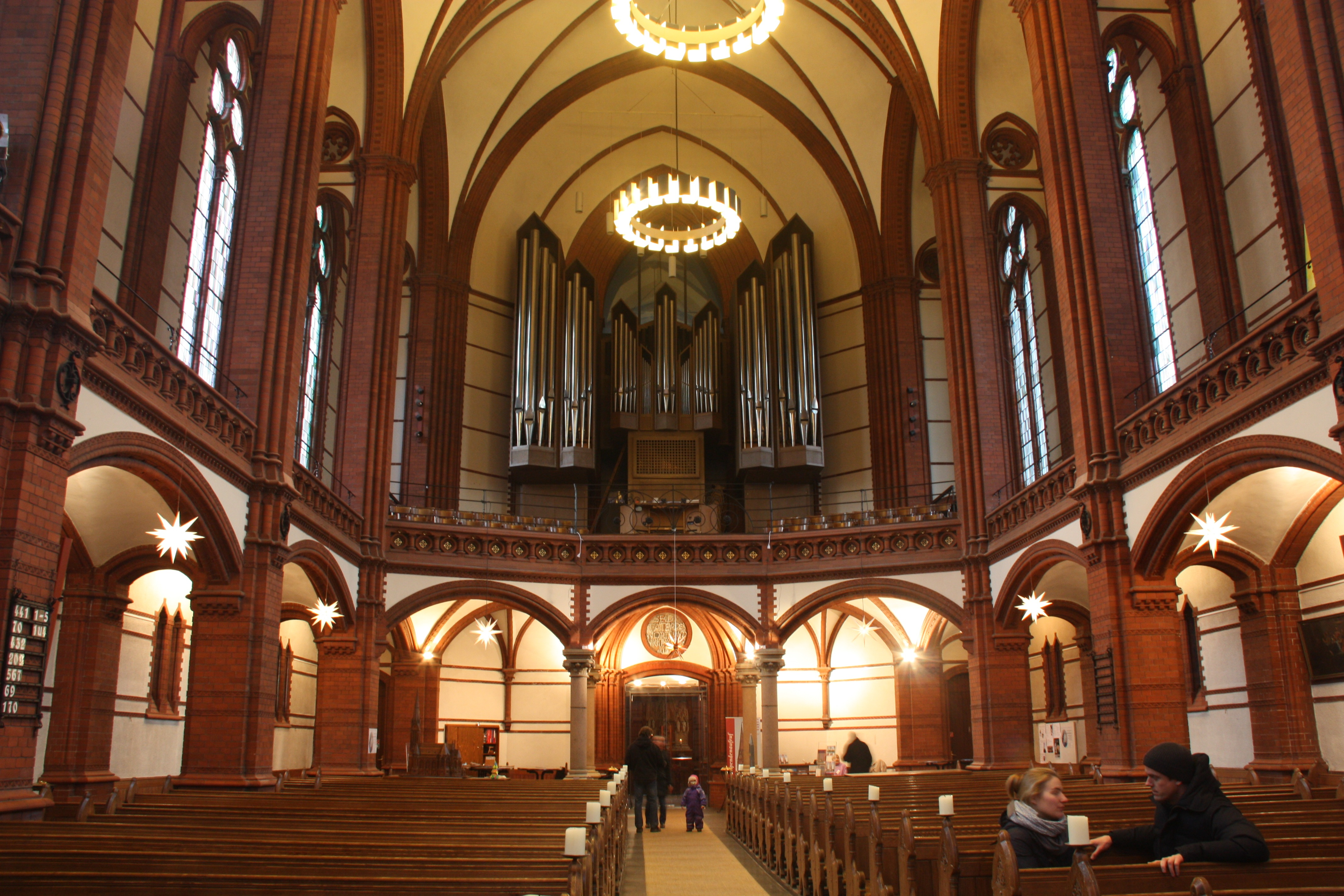 Hamburg, Uhlenhorst, Kirche St. Gertrud, Innenraum, Orgelempore